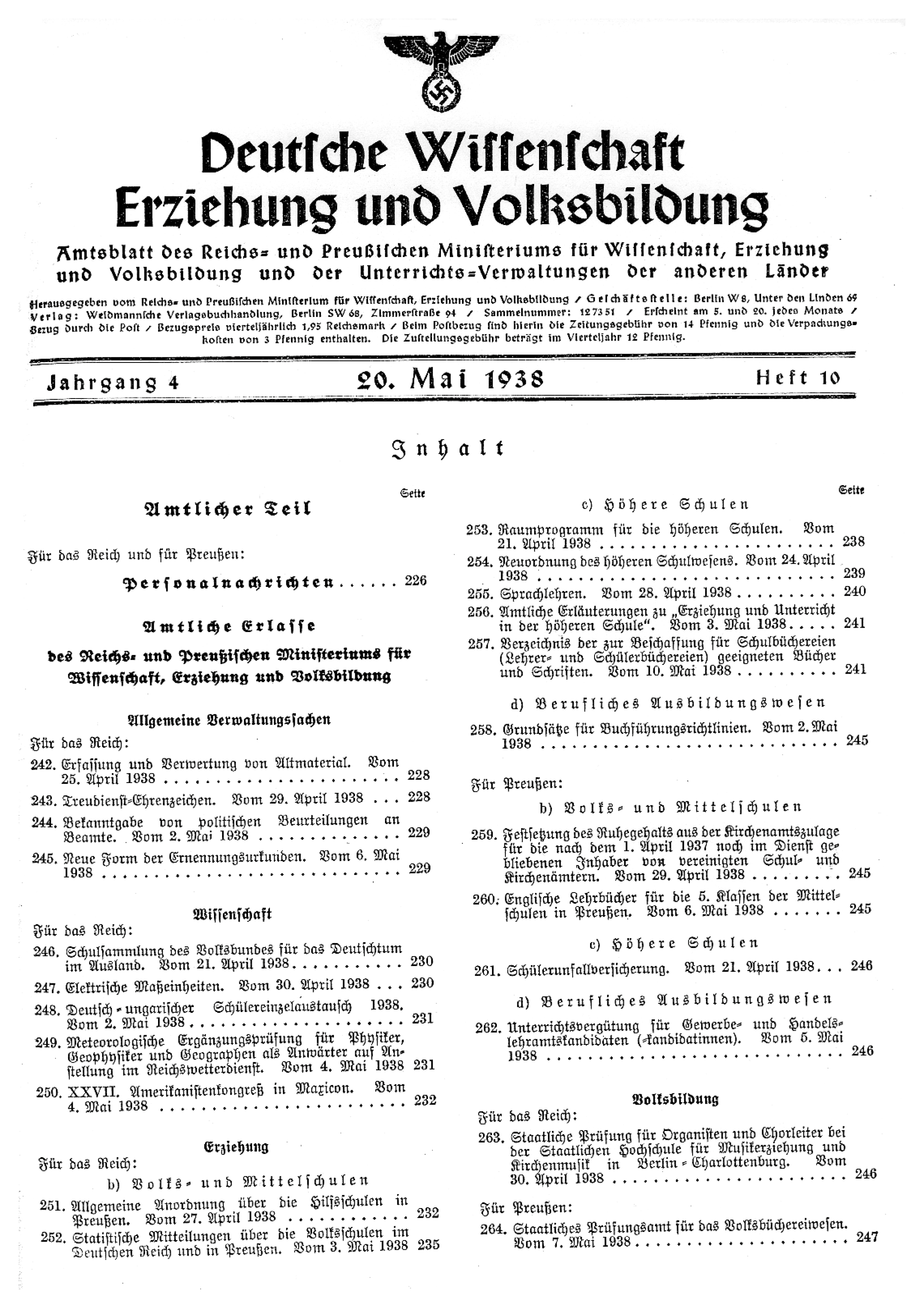 Titelblatt Deutsche Wissenschaft, Erziehung und Volksbildung vom 20. Mai 1938